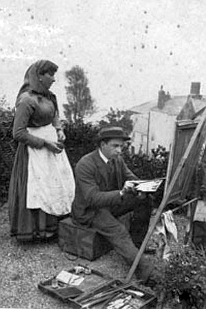 Painter Percy Robert Craft (1856-1934)